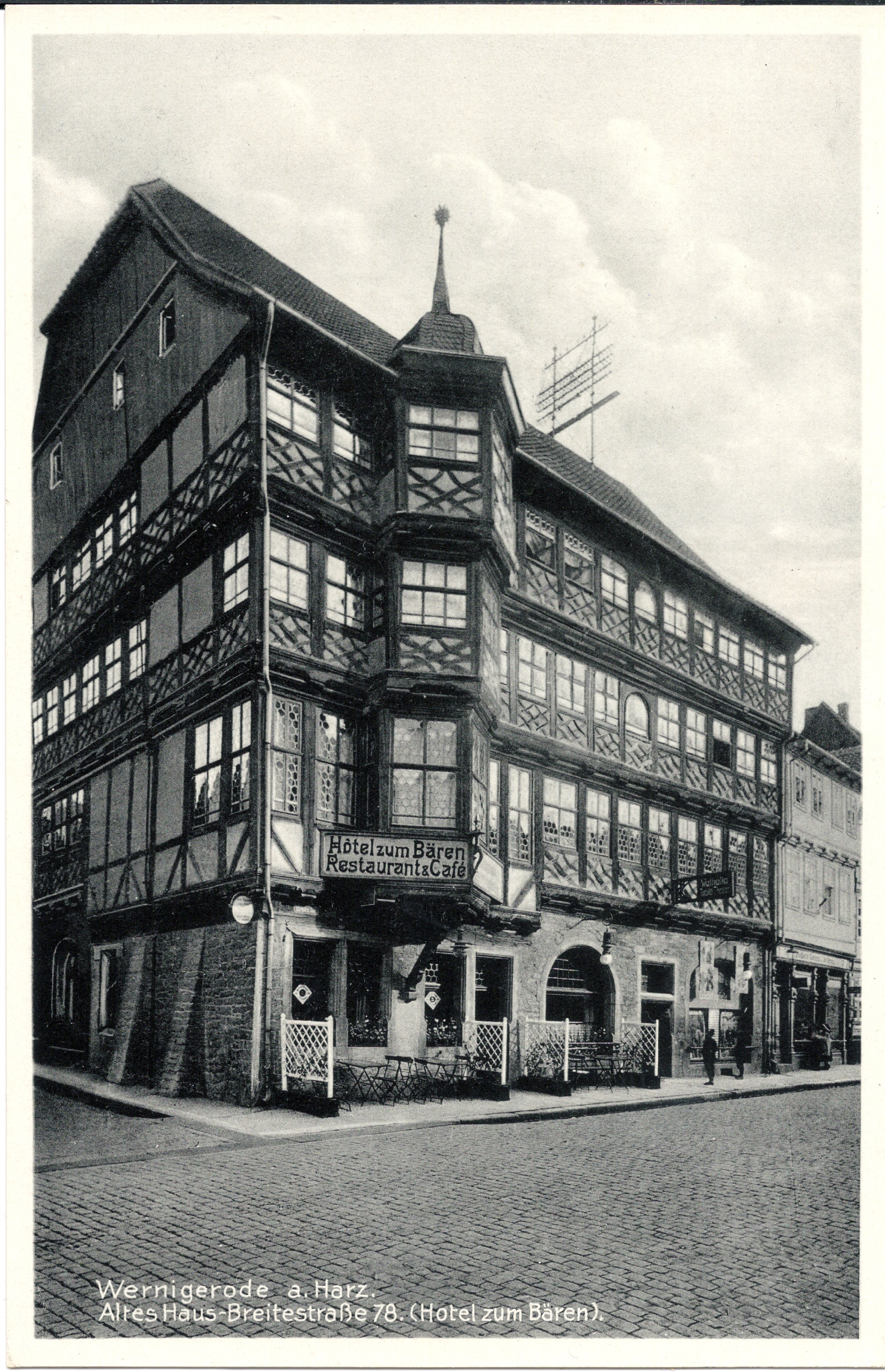 Postkarte vom Faulbaumschen Haus in Wernigerode, Breite Straße 78, Hotel zum Bären